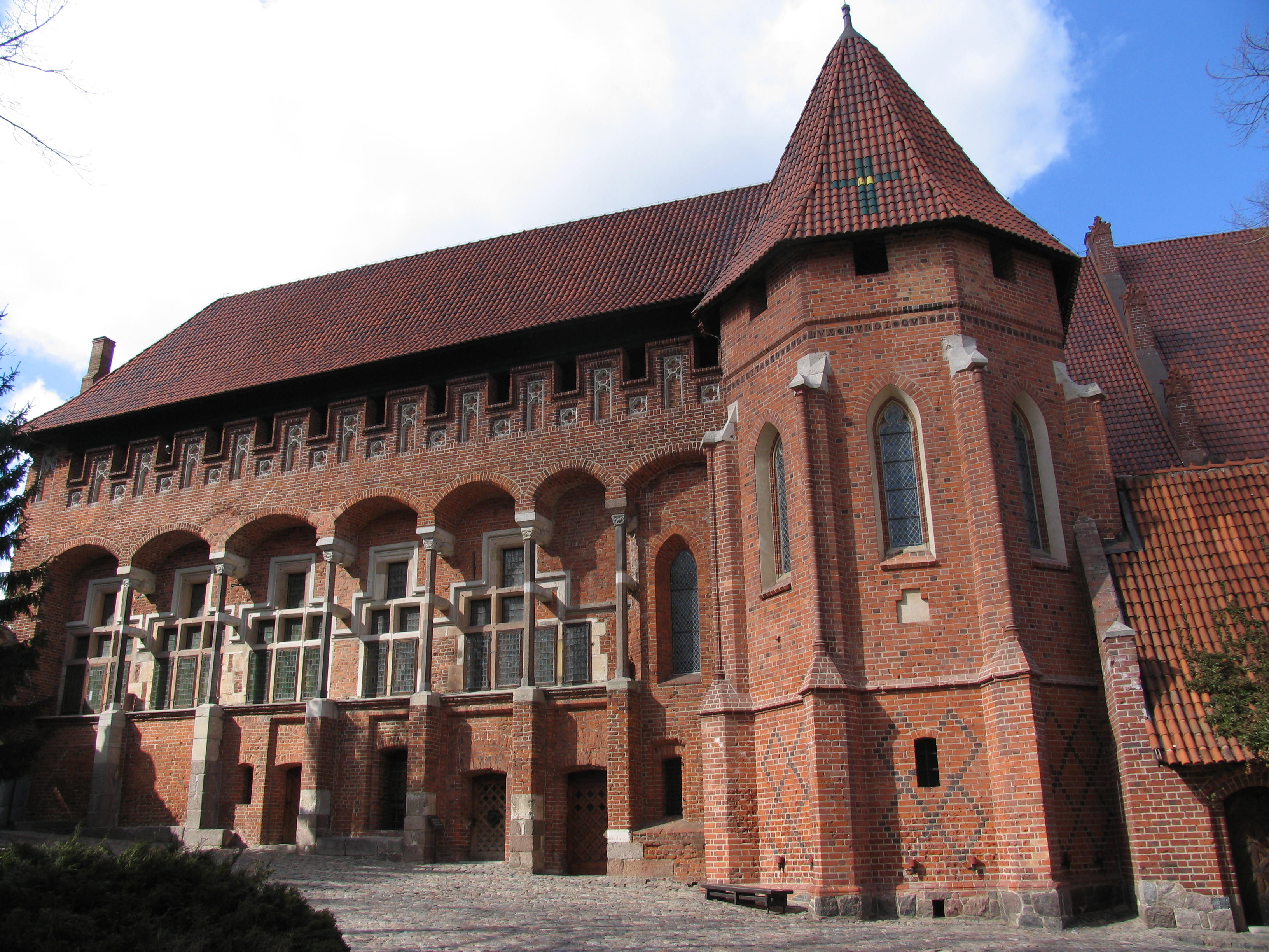 Malbork, zespół zamku krzyżackiego, XIII, XIX, Pałac Wielkich Mistrzów od strony dziedzińca i kaplica wielkich mistrzów